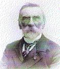 foto August Snieders